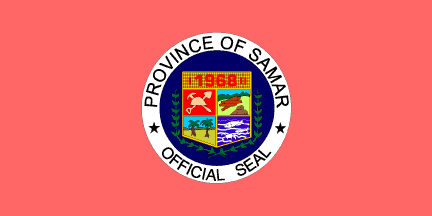 Dit materiaal is afkomstig van of en is door de auteur Jaume Ollé als GFDL beschikbaar gesteld, zie de toestemmingsemail. Hiermee vervallen de strictere voorwaarden in de disclaimers op de genoemde sites.Vrijgegeven bijdrage op Flags of the World van Jaume Olle. Zie deze verklaring op de Spaanstalige Wikipedia. GNU FDL